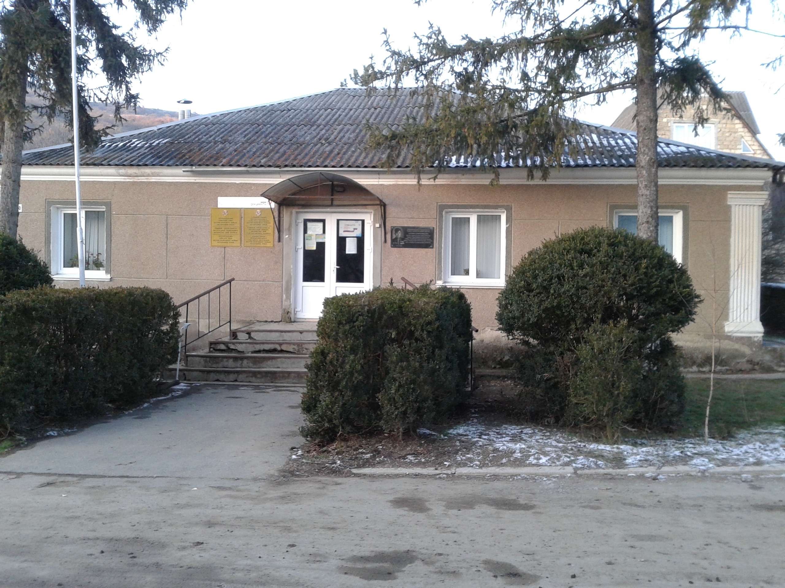 Сельская администрация, Верхоречье, Крым.